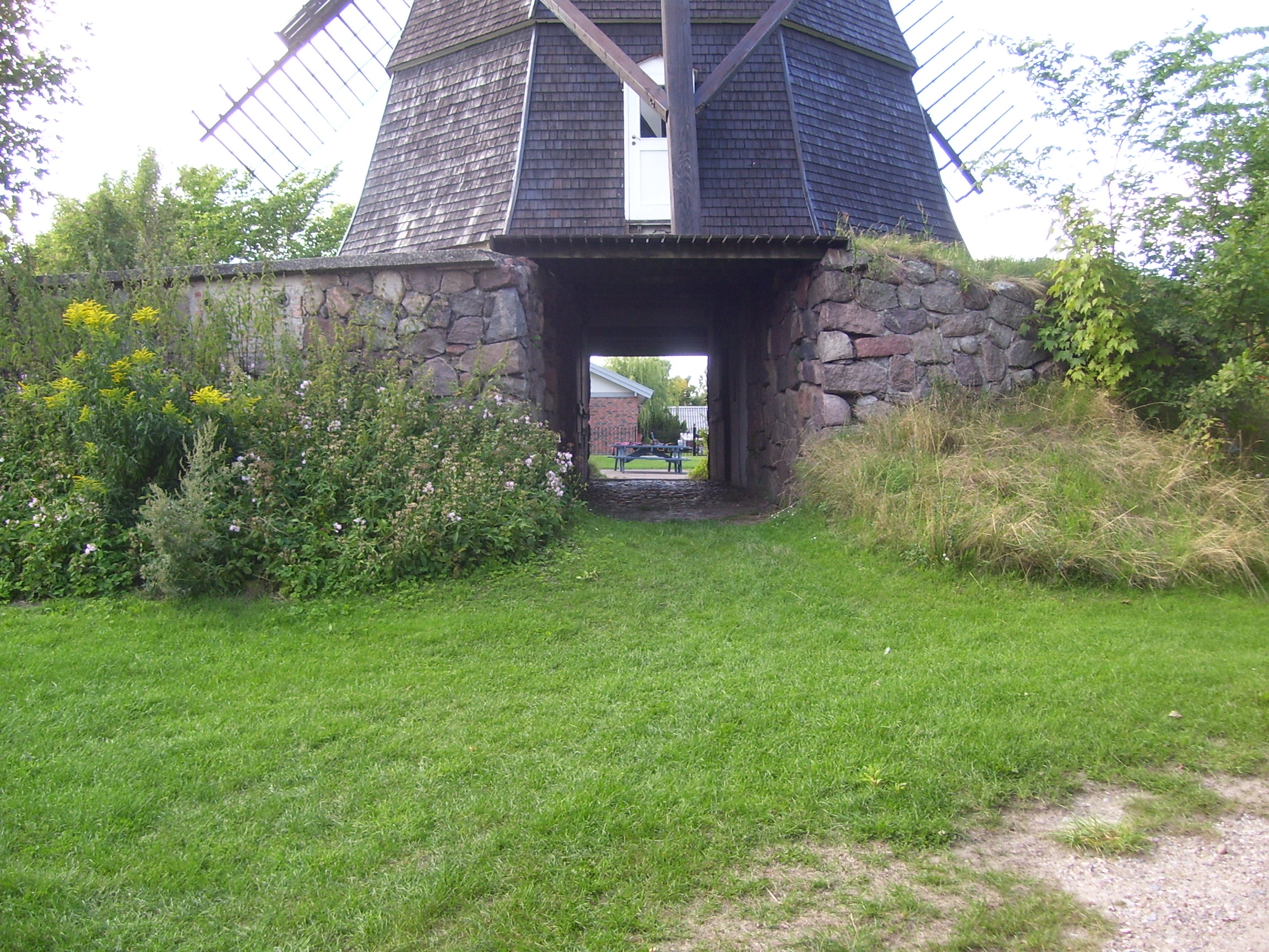 Gennemkørslen i Melby Mølle